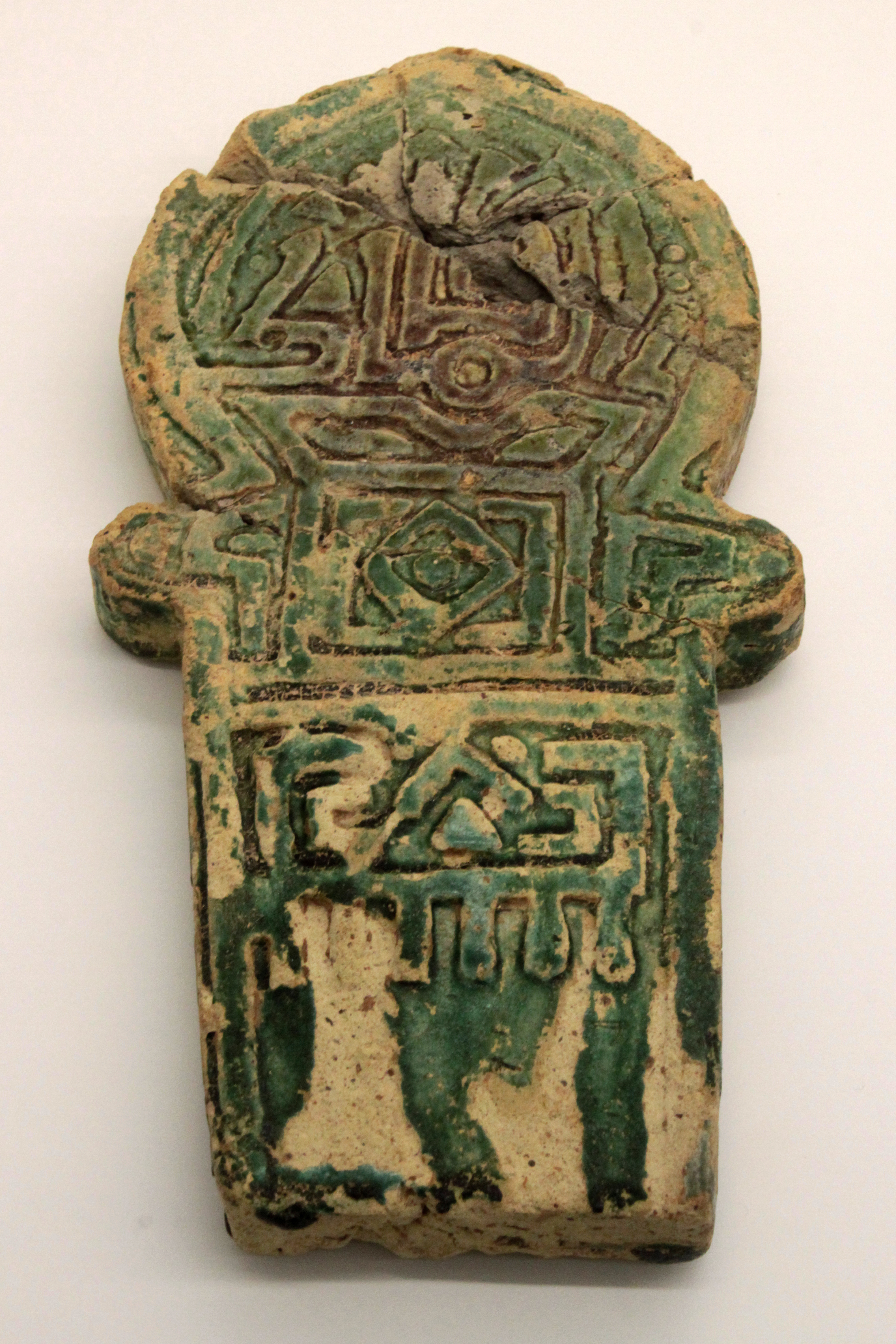 Estela funeraria de los siglos XIII y XIV perteneciente al yacimiento de la necrópolis de El Fonsario de Algeciras .Museo municipal de Algeciras, Andalucía, España.